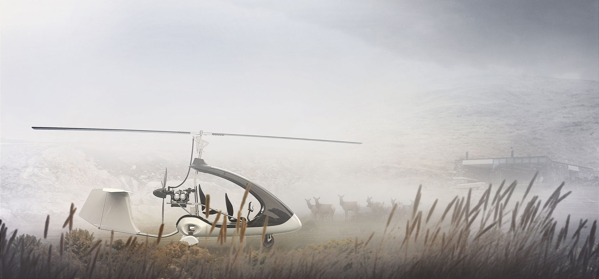 Projekt polskiego biura projektowego 2sympleks - Wzornictwo przemysłowe, który została nagrodzony nagrodą Red Dot Design Award w 2018 roku.